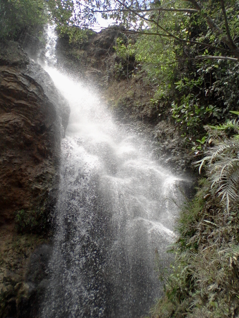 Air Terjun Sri Gethuk Desa Bleberan kabupaten Gunungkidul